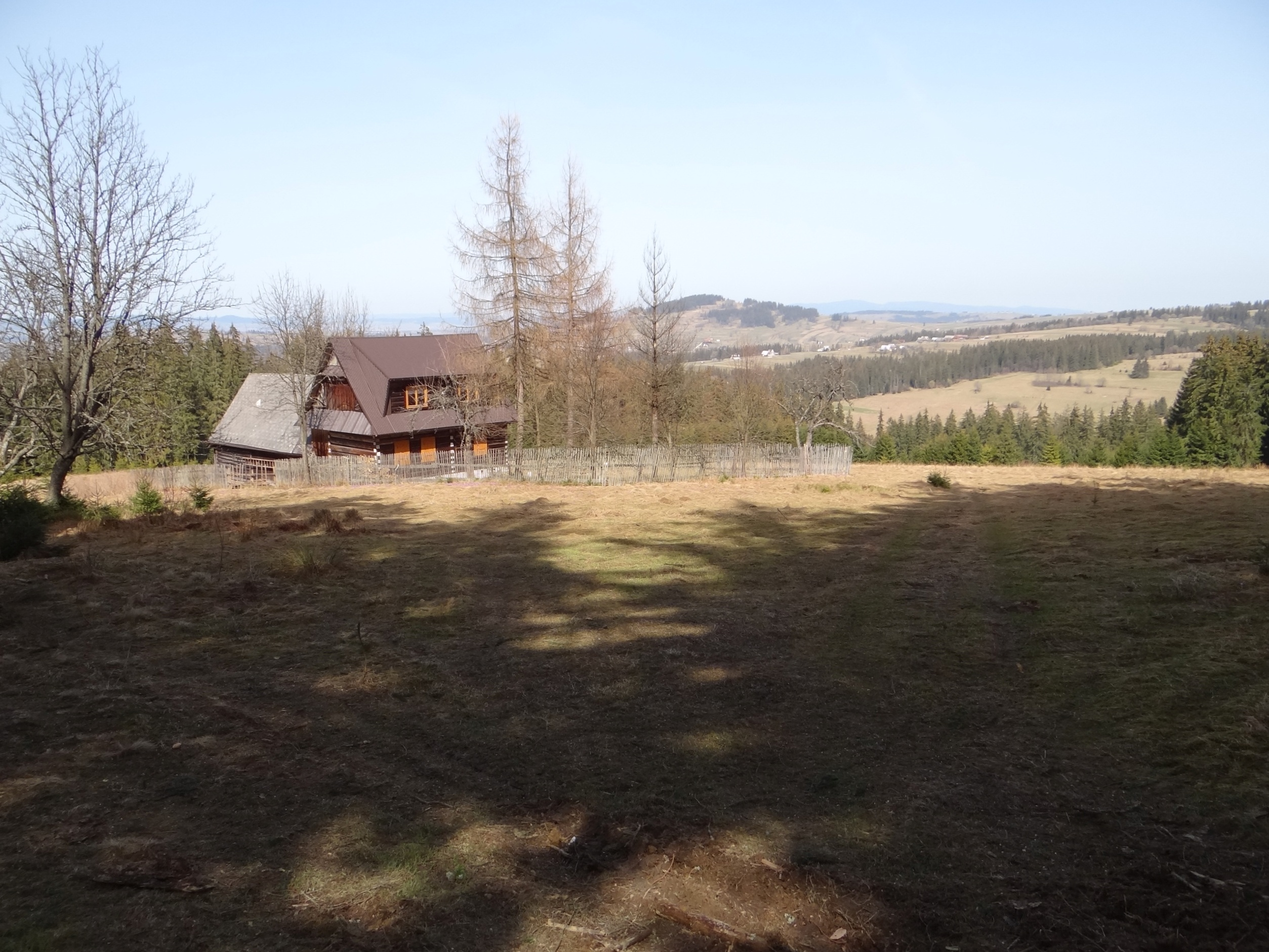 Polana Mnichówka na Przysłopie Witowskim